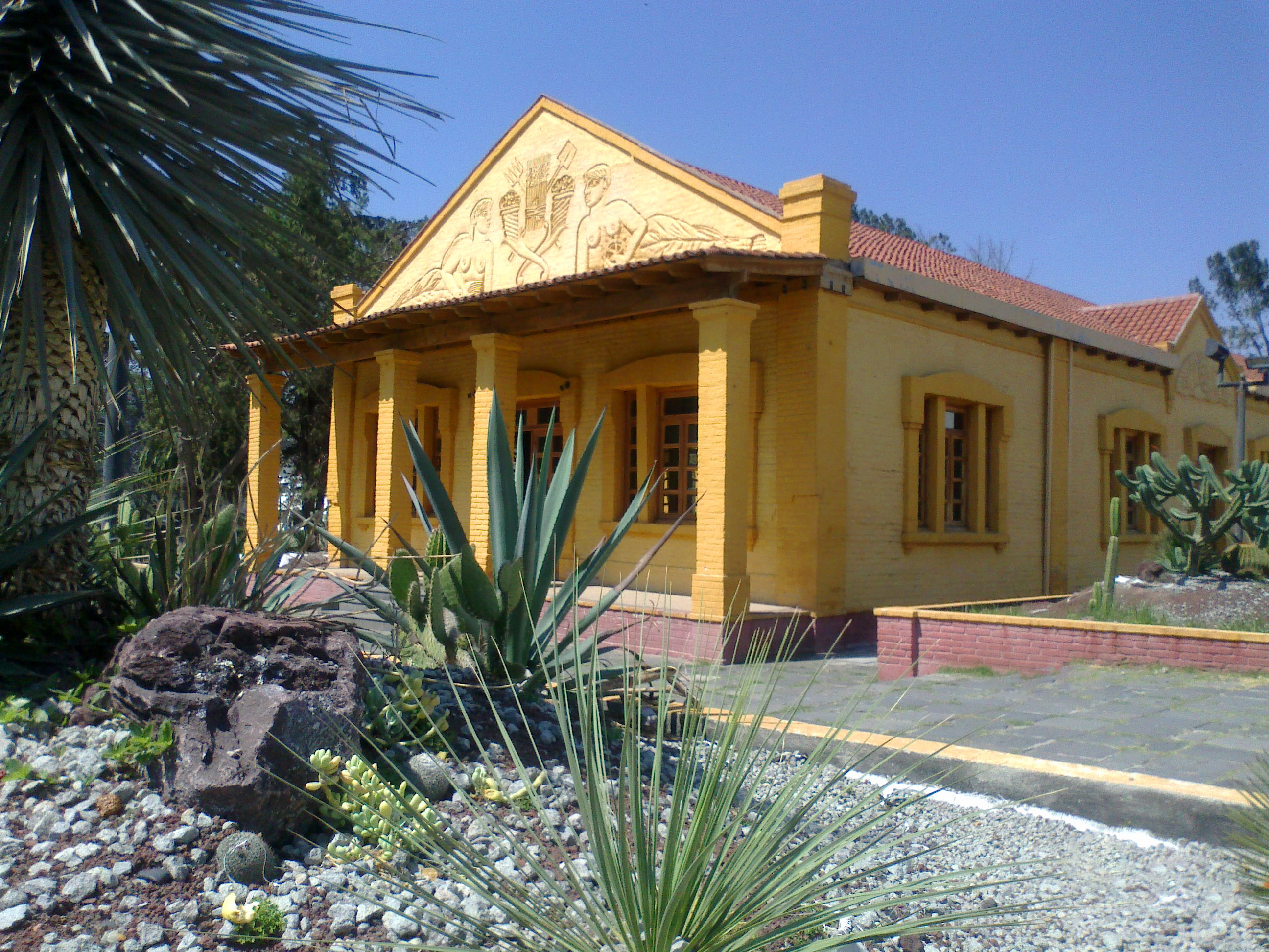 El partenon universitario, es la actual sede del consejo universitario, donde se reúnen los organos de gobierno de la Universidad Autónoma Chapingo